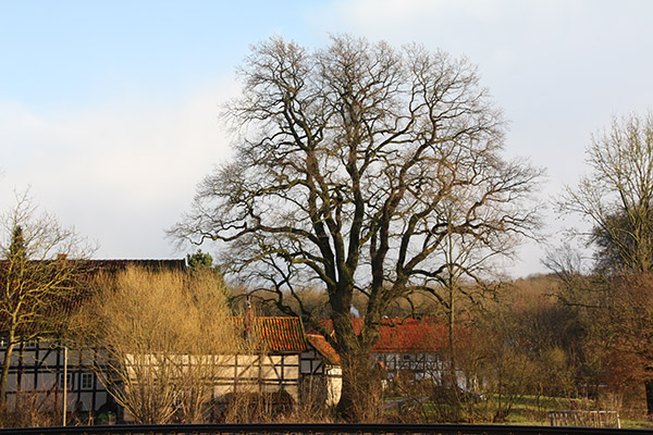 Eiche in Emmenhausen